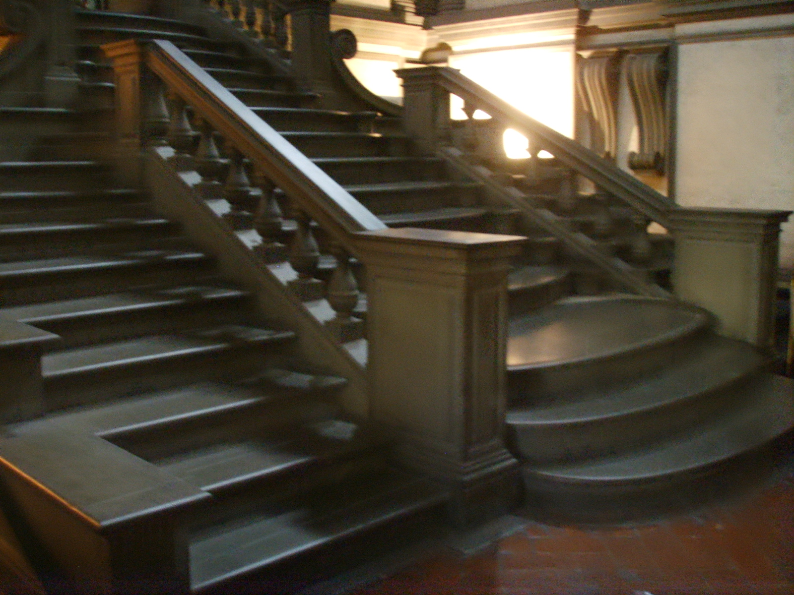 Biblioteca medicea laurenziana scalone di michelangelo